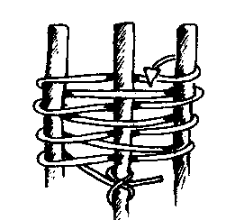 Tripod lashing 1